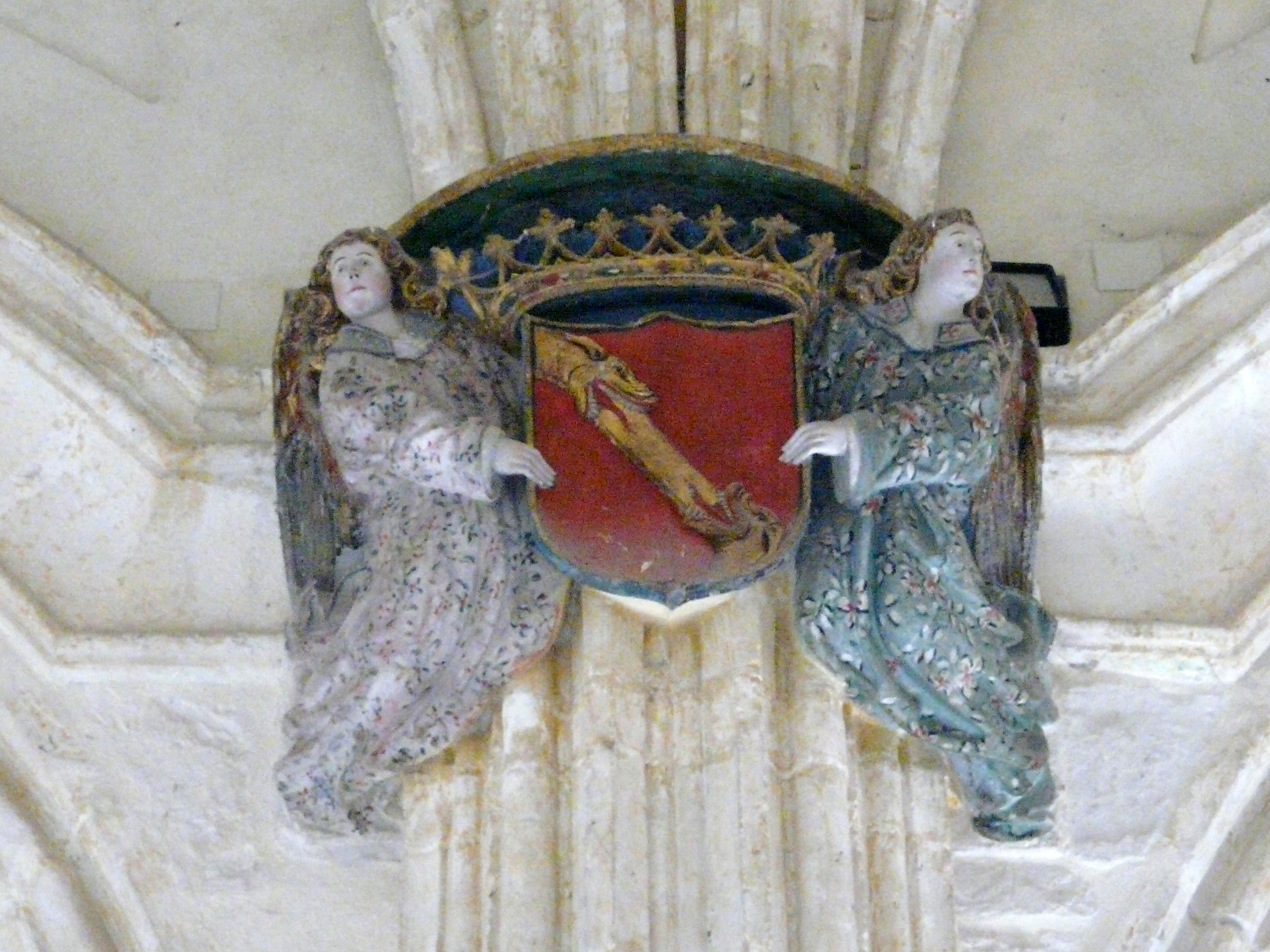 Escudo de armas de la Casa de Trastámara entre Ángeles tenantes en el Atrio de la Iglesia del Monasterio de Santa María de El Paular en Rascafría (Madrid). Finales siglo XV.